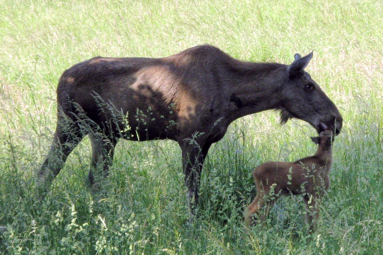 Elchkuh mit Kalb (Alces alces) im Tiergarten Weilburg